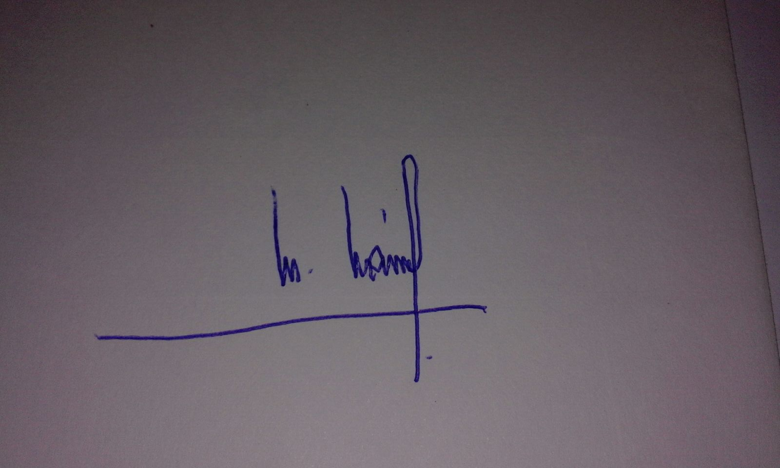 Firma de Miguel Ángel Marín, primer alcalde de Logroño.